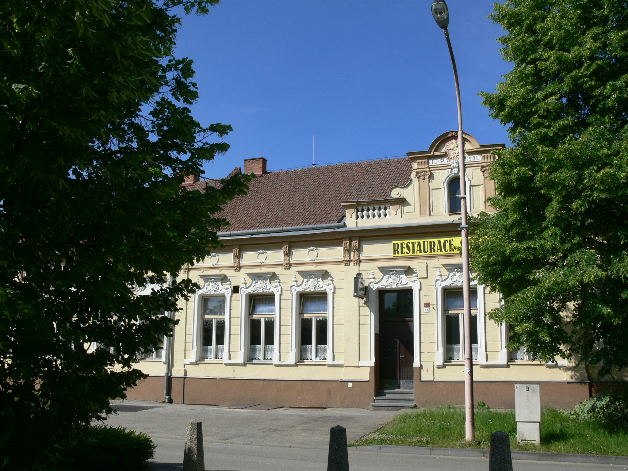 Dědice, Sokolovna, náměstí Svobody